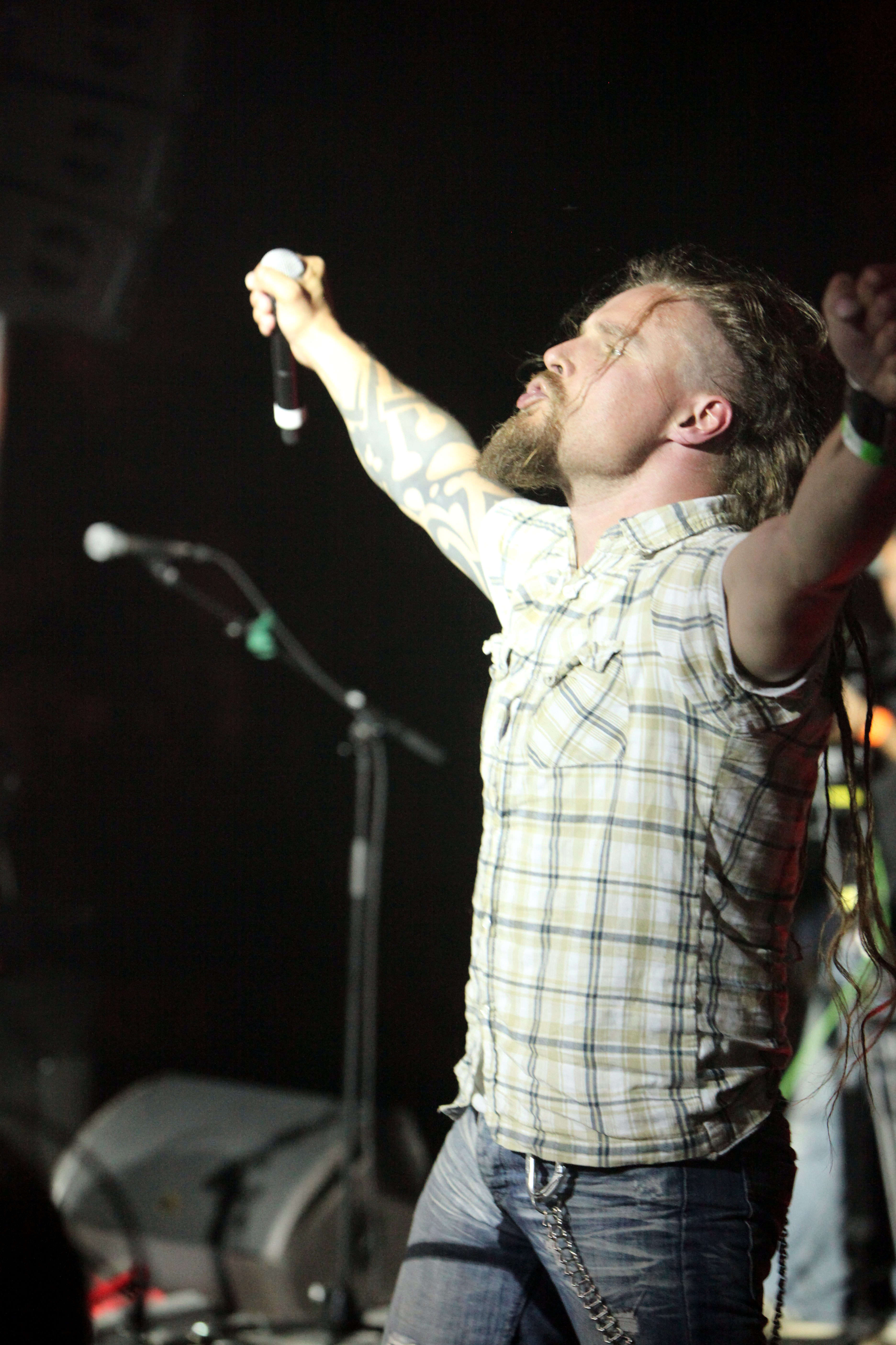 Zuul FX at Balelec 2011